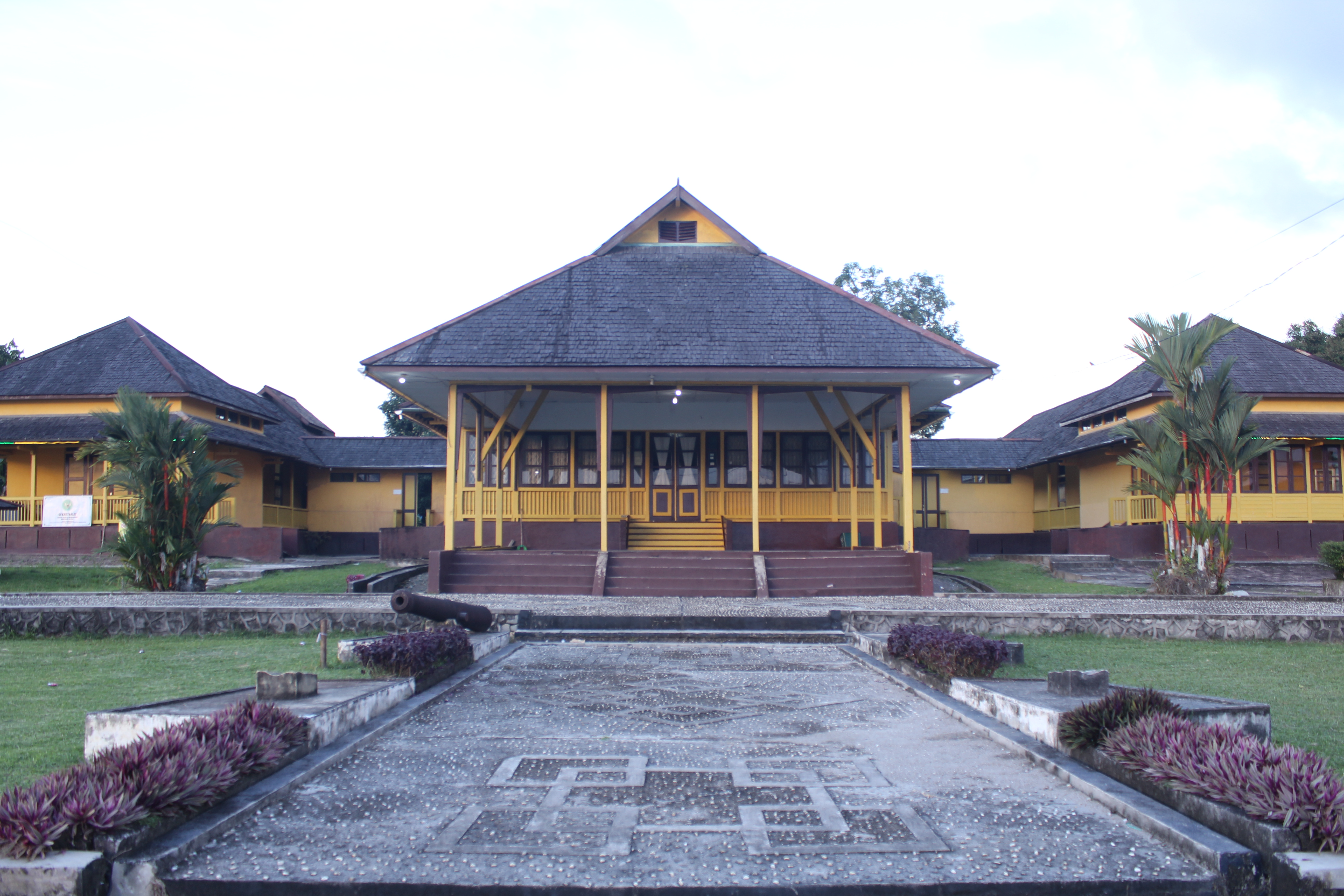 Istana Al-mukarramah Kesultanan Sintang atau Keraton Sintang merupakan cagar budaya historis yang terletak di Jalan Bintara, Kelurahan Kapuas Kiri Hilir, Kecamatan Sintang, Kabupaten Sintang, Provinsi Kalimantan Barat